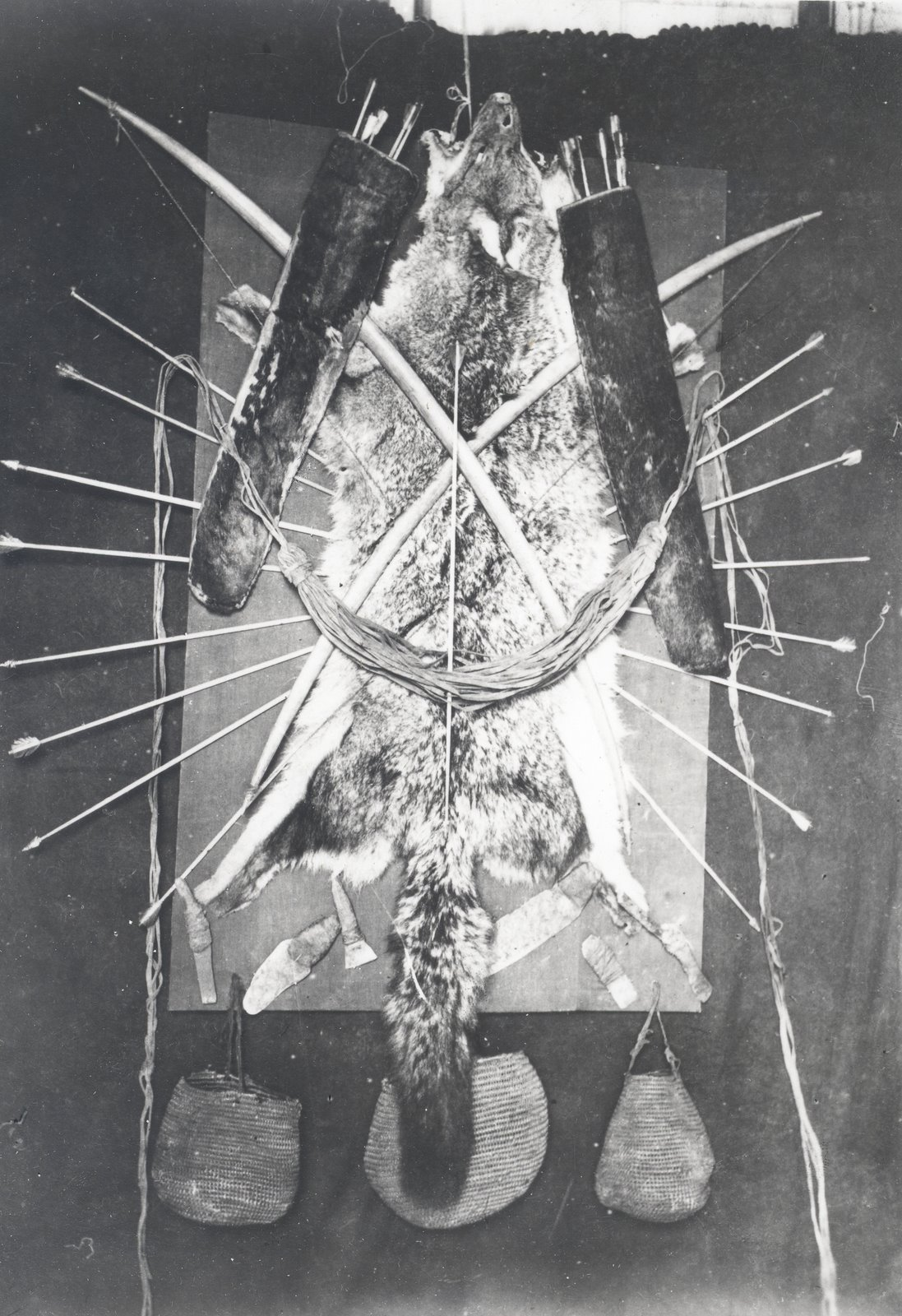 Objetos saqueados a los Onas por Julius POpper